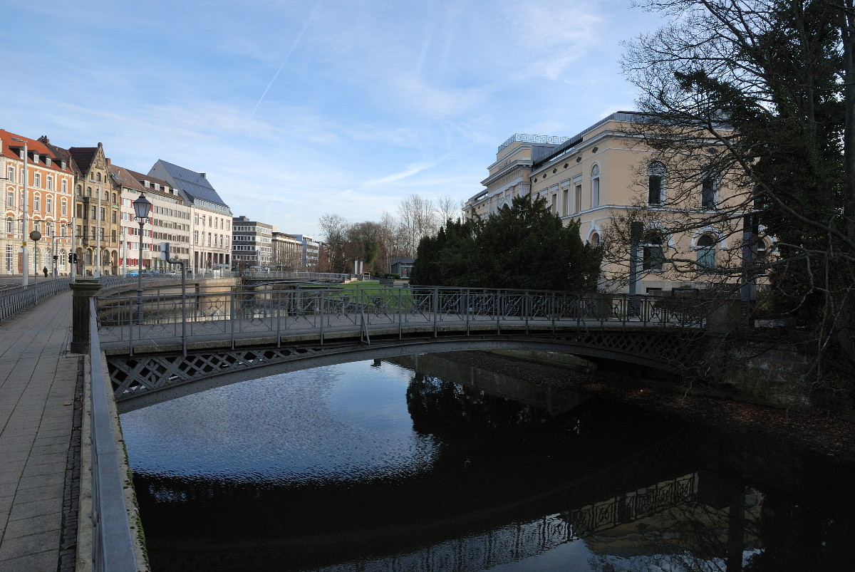 Westliche Brücke über die Okerumflut am alten Hauptbahnhof von Braunschweig